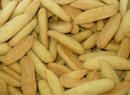 Bizcocho de achira